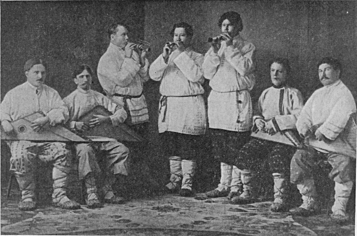 Хор Гдовских гусляров под руководством О.У. Смоленского.